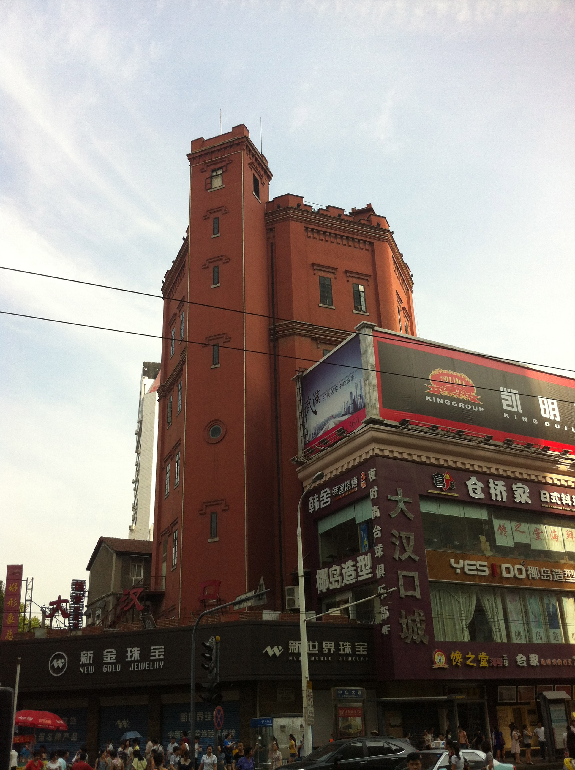 中文（中国大陆）: 原汉口水塔